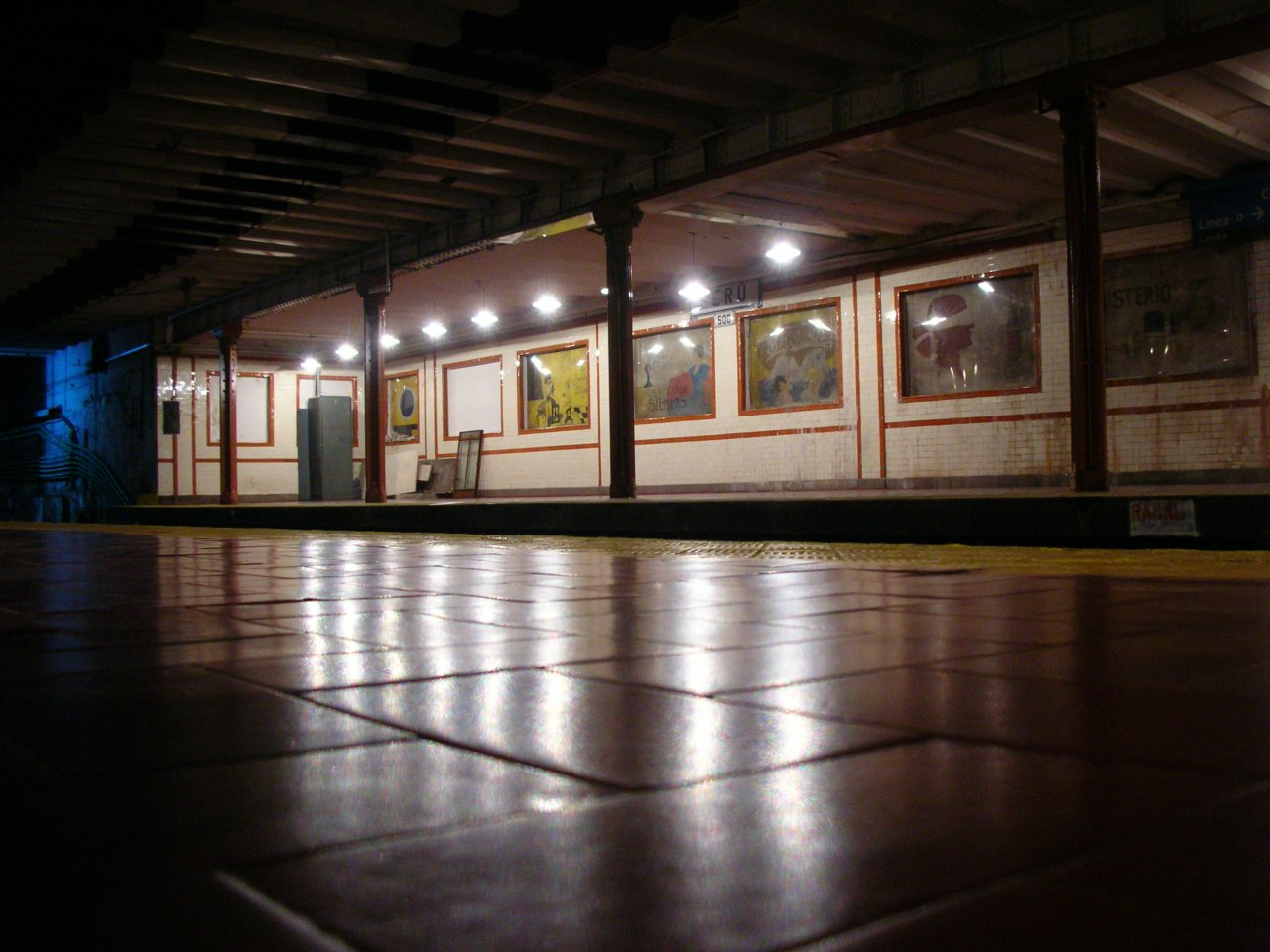 La estación Perú de la línea A del subterráneo porteño, conservada como en 1913